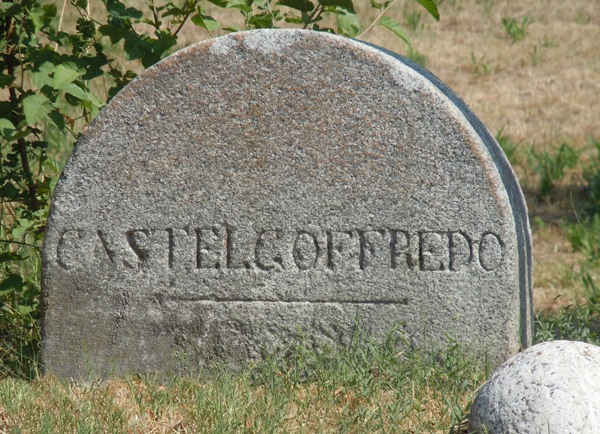 Casaloldo, segnale stradale, seconda metà '800.